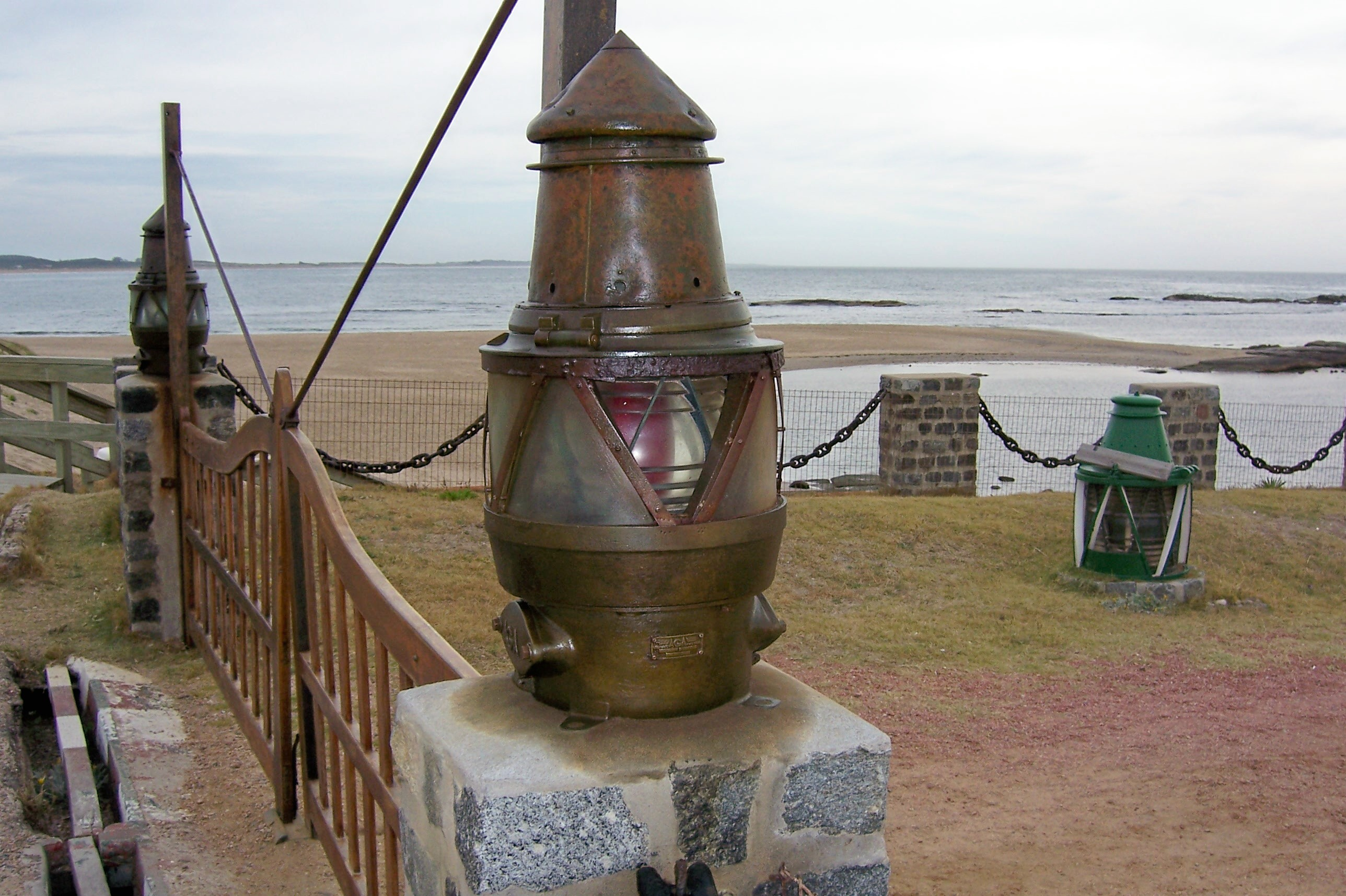 Faro de José Ignacio, Uruguay. Farolas que ornamentan el portón de acceso.